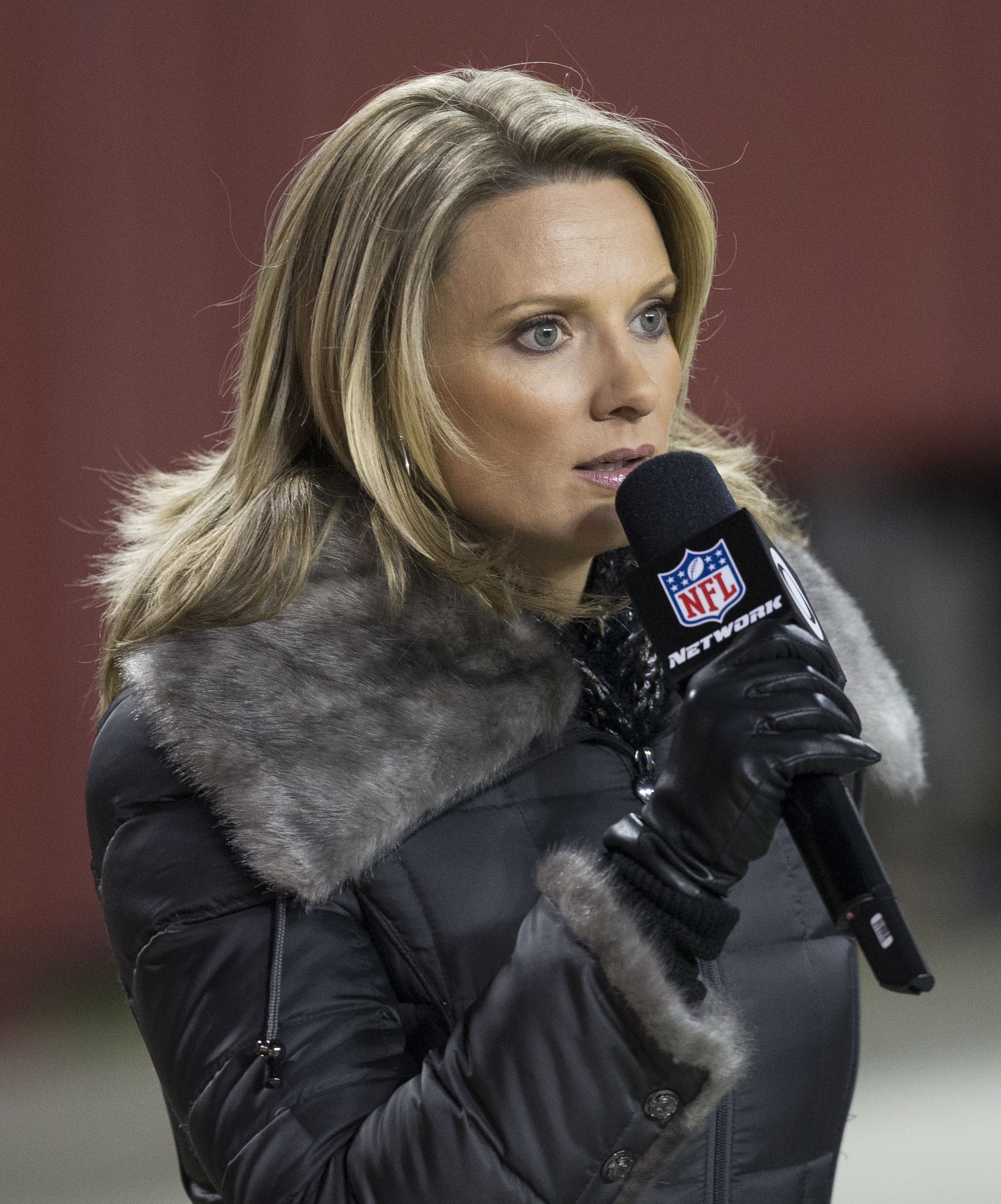 Eagles at Redskins 12/20/14